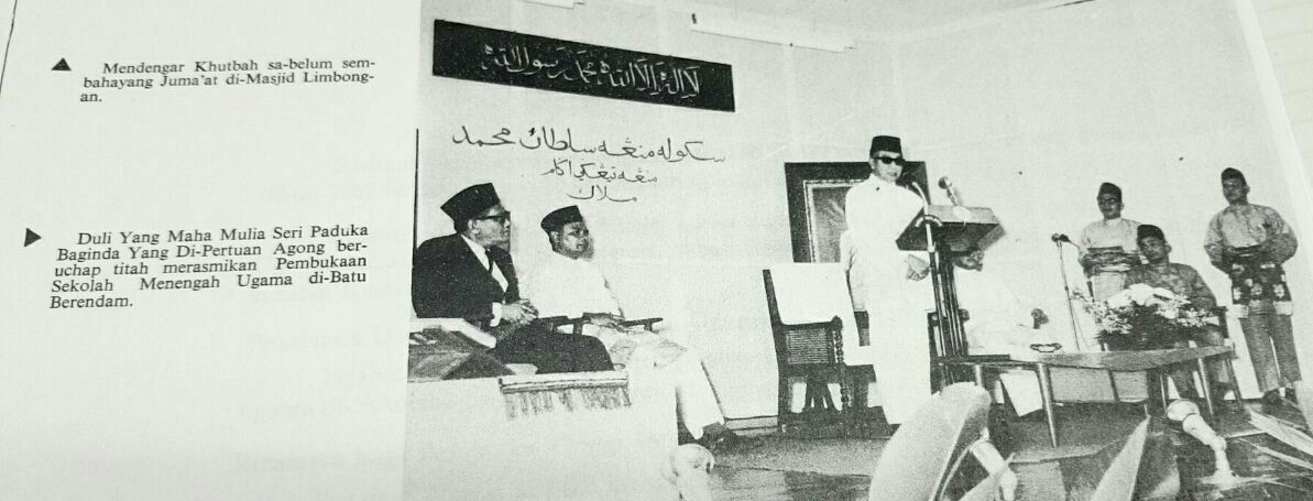 Perasmian oleh Duli Yang Maha Mulia Seri Paduka Baginda Yang Dipertuan Agung